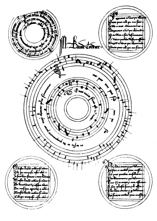 Canon circulaire du manuscrit Chantilly, au musée Condé. L'autre chanson de Baude Cordier